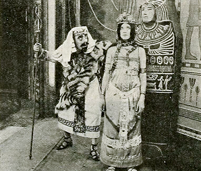 Photo du film